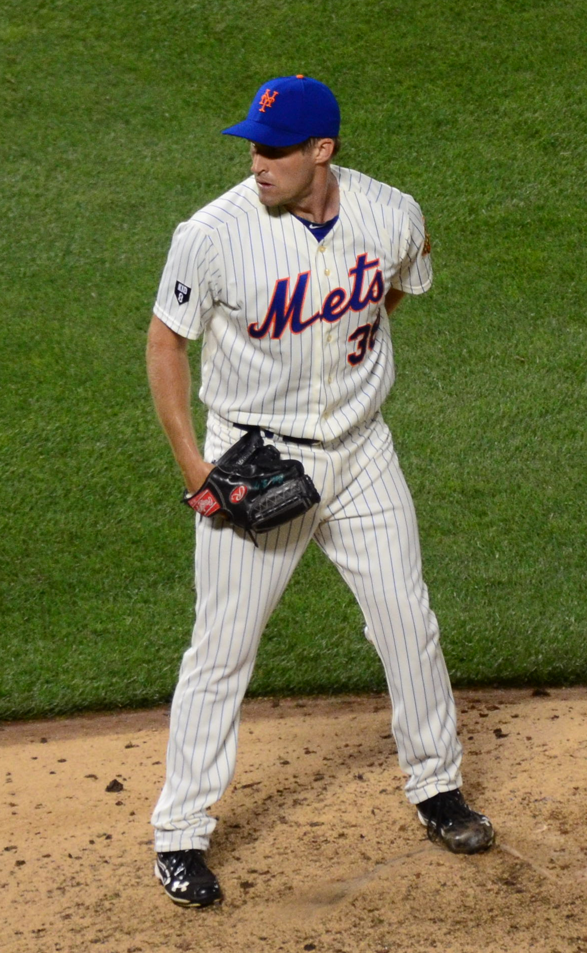 Garrett Olson